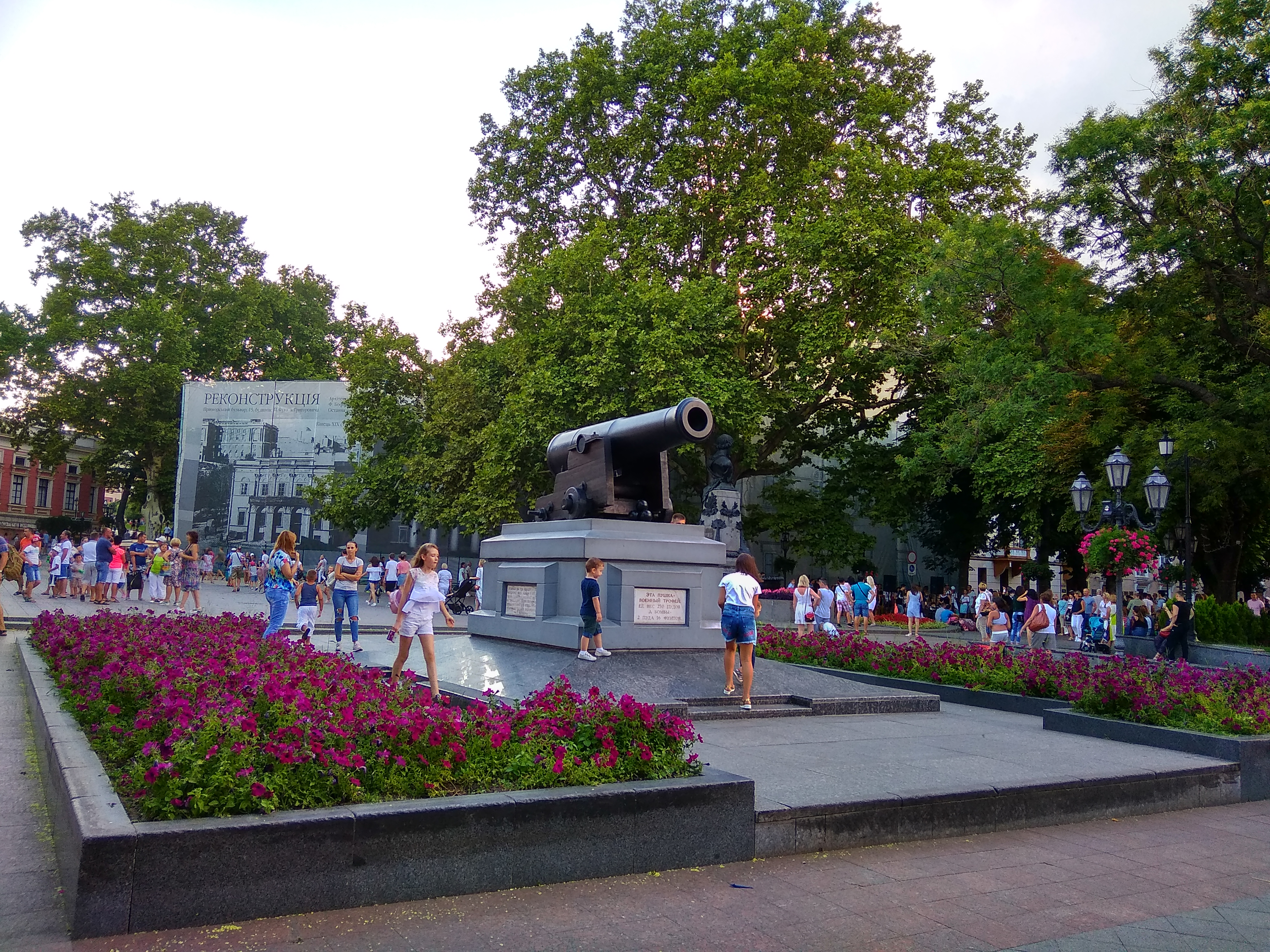 Гармата з фрегату “Тигр”: гармата сталева, лафет дерев’яний, постамент - бетон облицьований сірою гранітною плиткою, Одеса, пл. Думська, 1